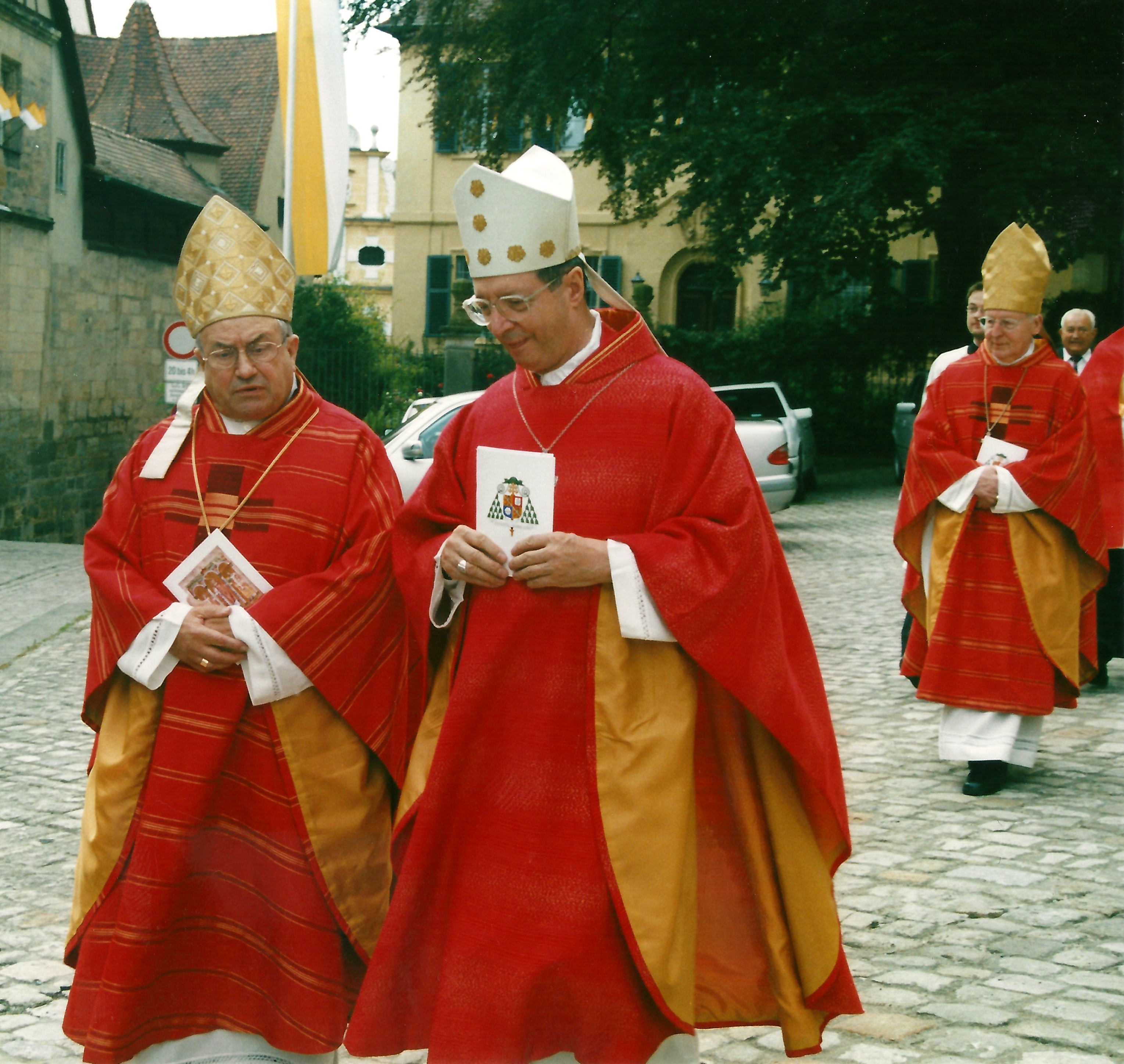 Bildmitte: Apostolischer Nuntius Giovanni Layolo Bild links: Karl Kardinal Lehmann Mainz. Bild rechts: Friedrich Kardinal Wetter Erzbischof von München und Freising. Am 21. September 2002 fand im Kaiserdom zu Bamberg die Amtseinführung von Weihbischof Prof. Dr. Ludwig Schick Fulda zum neuen Erzbischof von Bamberg statt. Das Foto entstand beim Einzug in den Hohen Dom zu Bamberg.